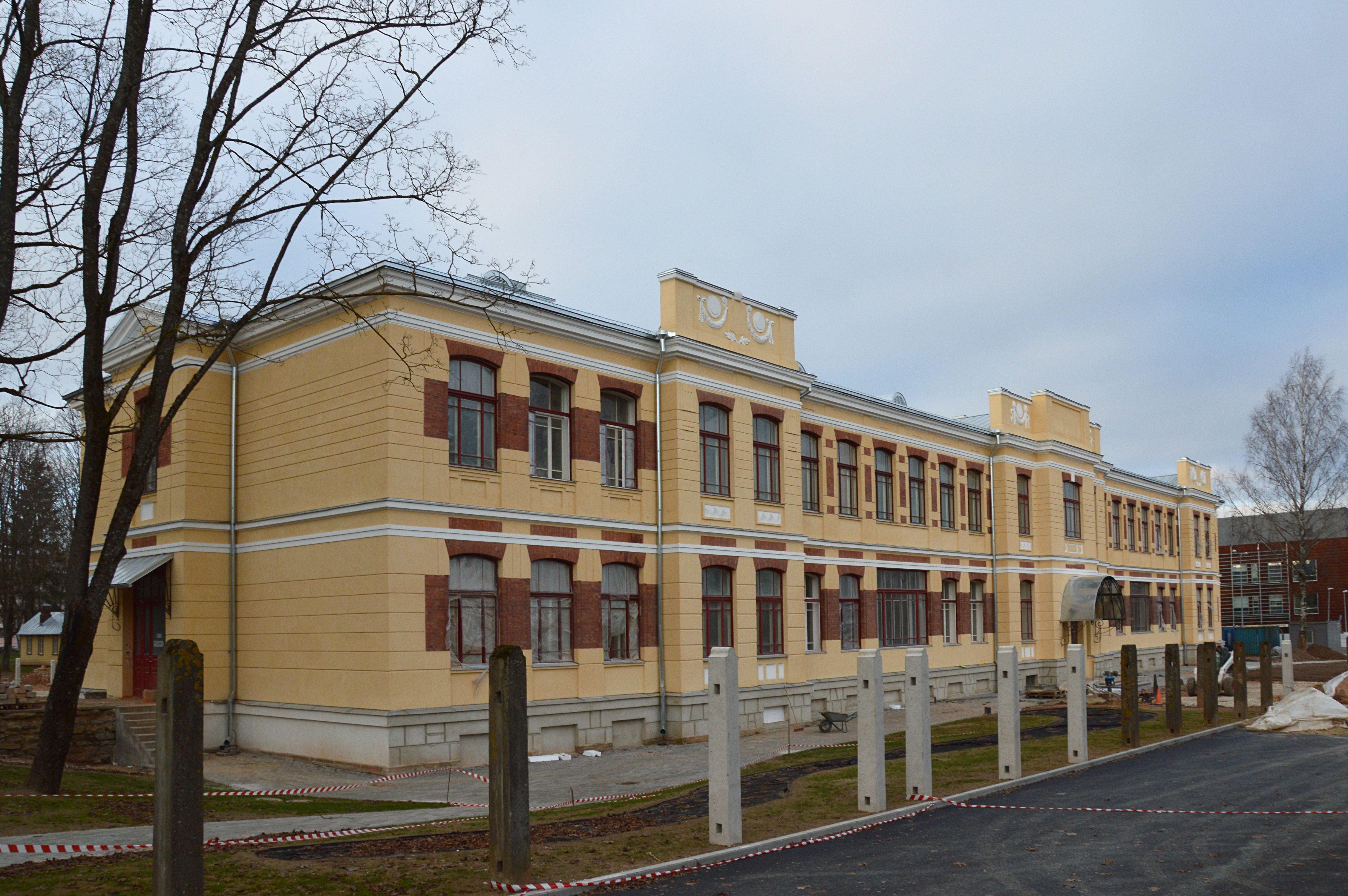 TÜ Kliinikumi endine sisekliiniku hoone renoveerimise lõpus.